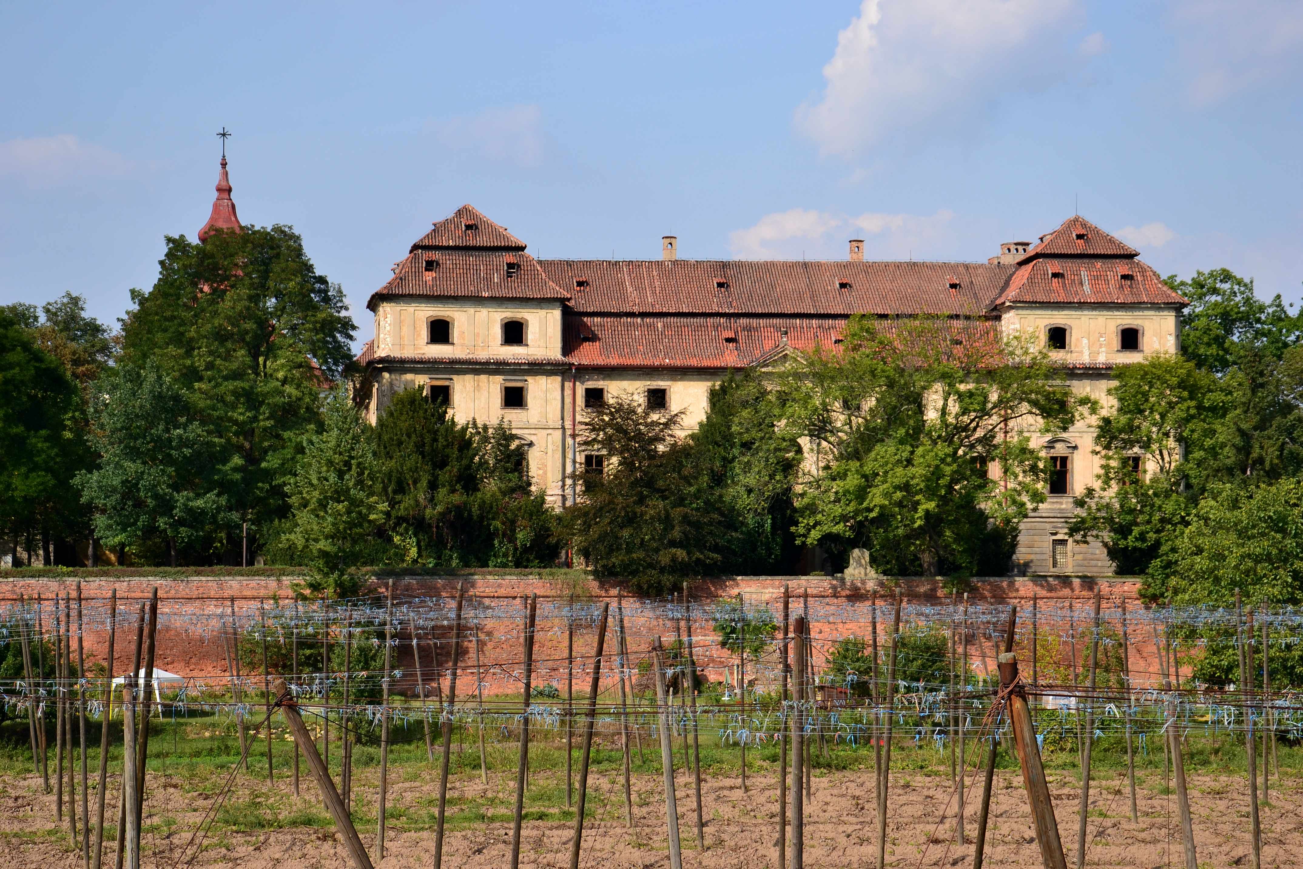 Pohled na zámek ze záplavového mostu